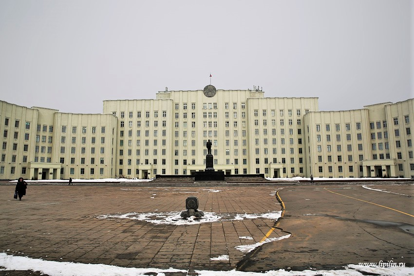 Магілёў. Дом урада